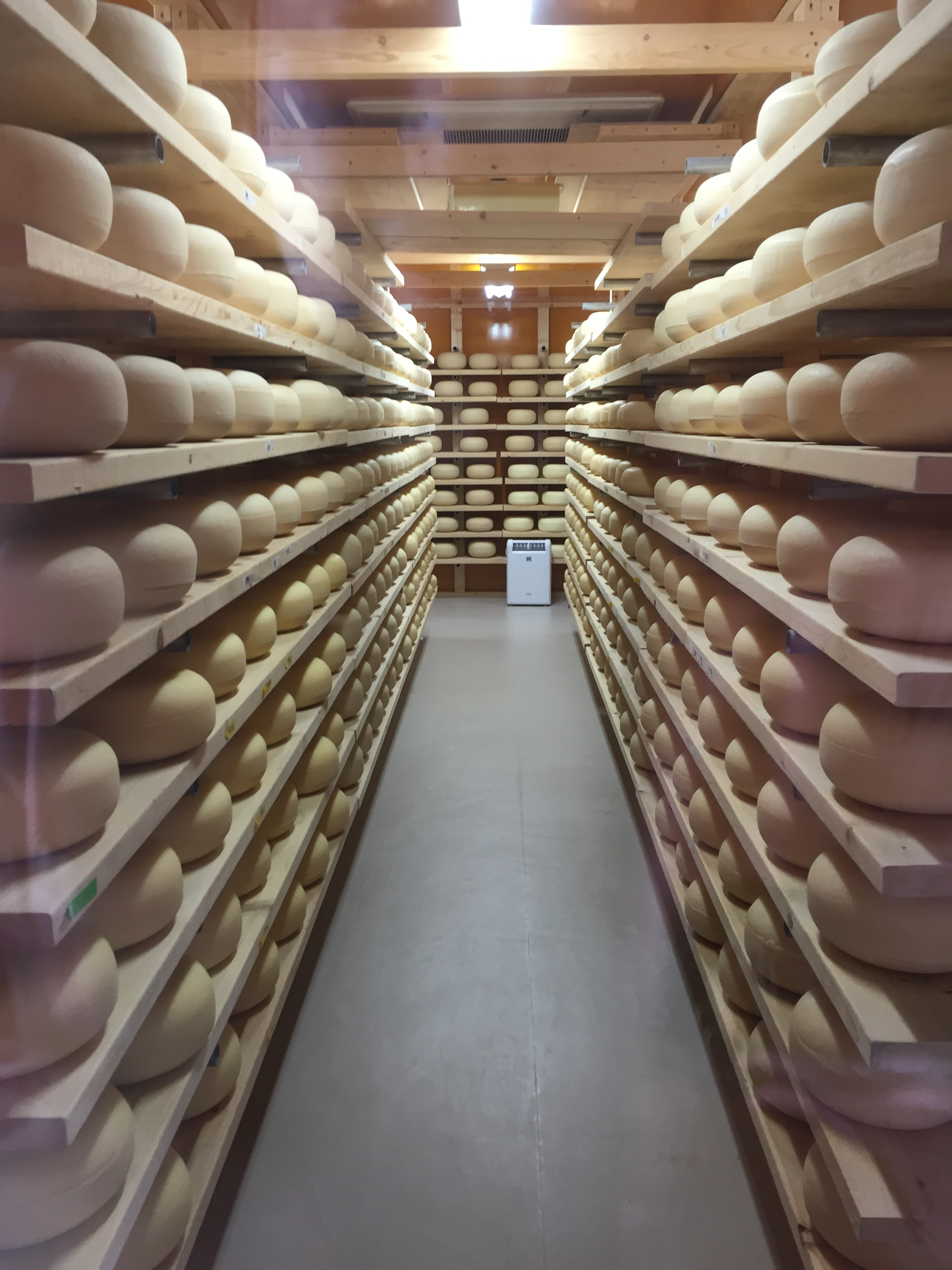 北海道帯広の花畑牧場のチーズ熟成庫